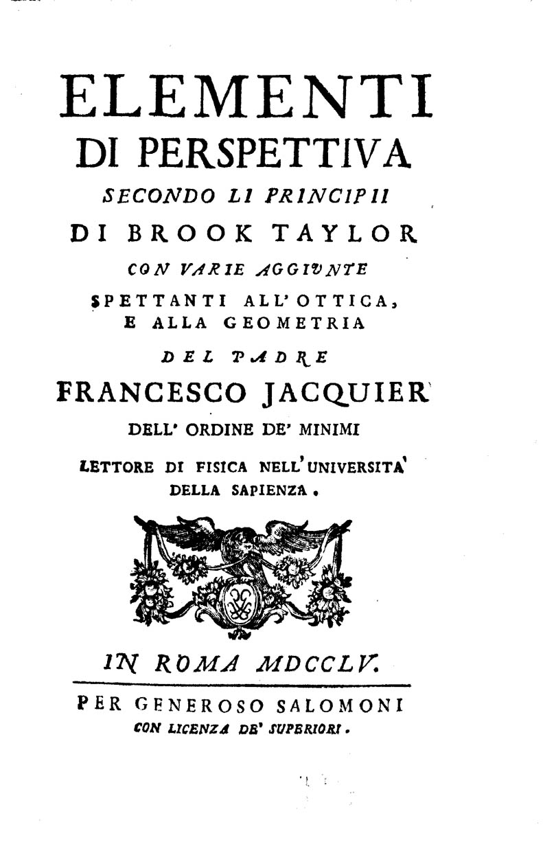 Frontespizio